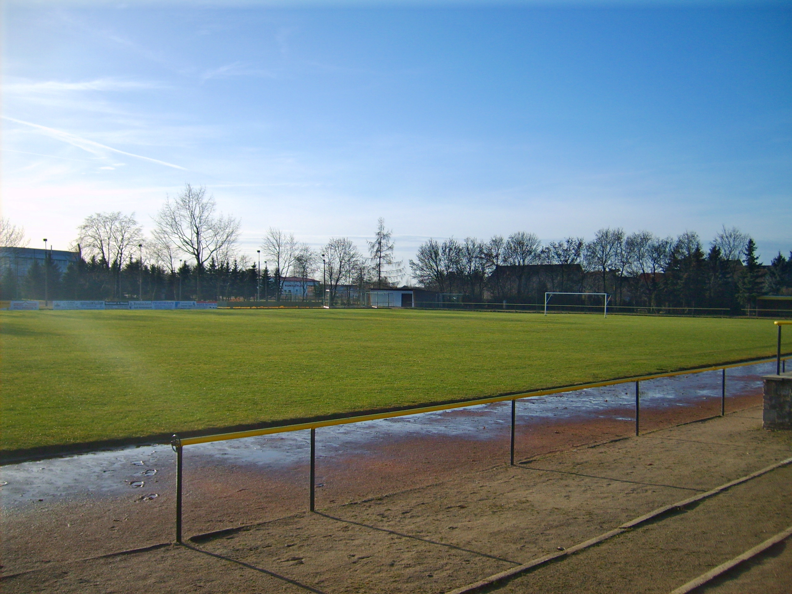 Der Sportplatz in Elsterwerda-Biehla